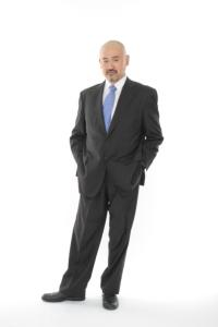 コビヤマ洋一